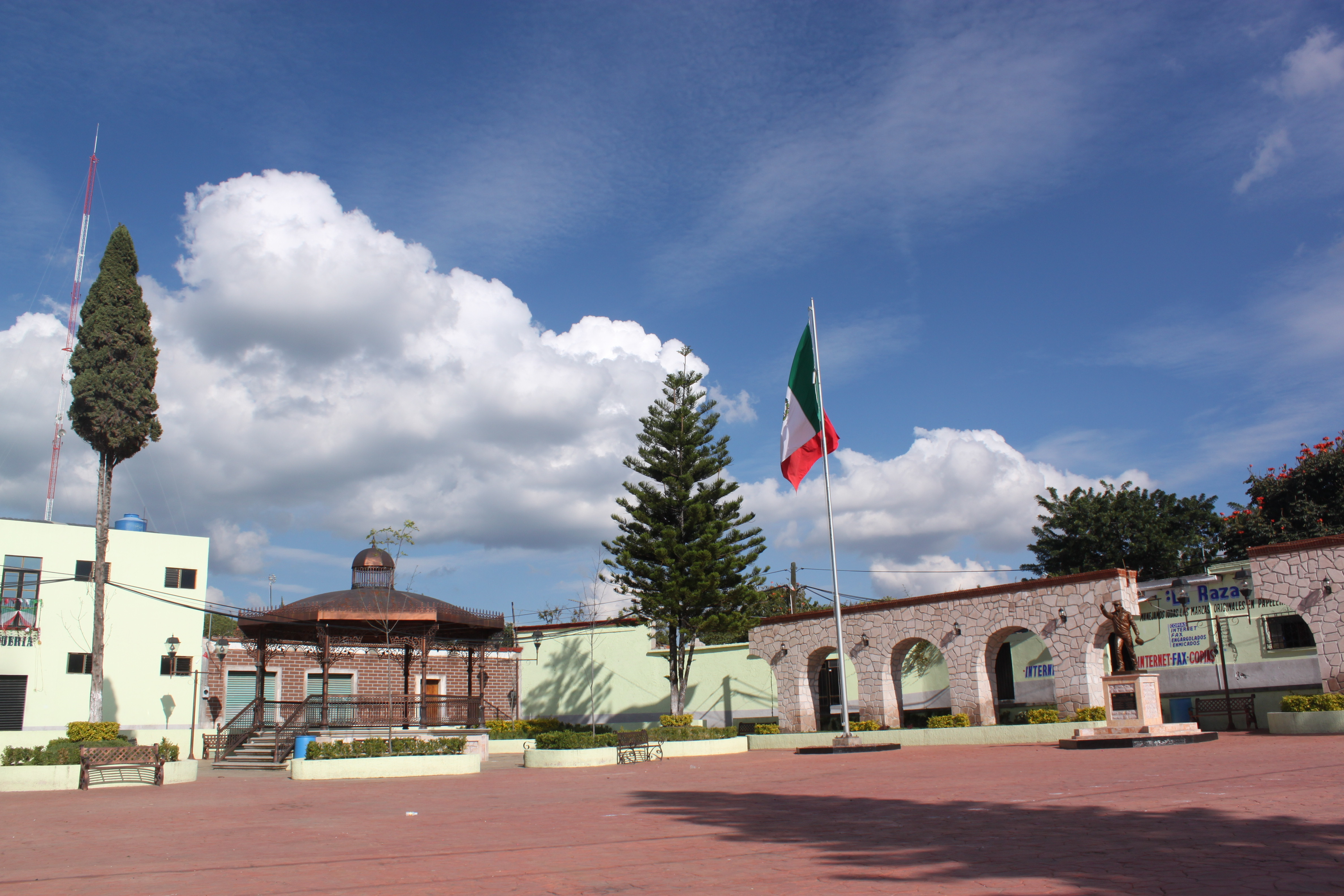 Centro de Tlacotepec, Morelos, México. Restaurado en 2014.